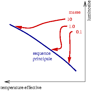 é‰toiles jeunes dans le diagramme de Hertzsprung-Russell. Auteur : Régis Lachaume.